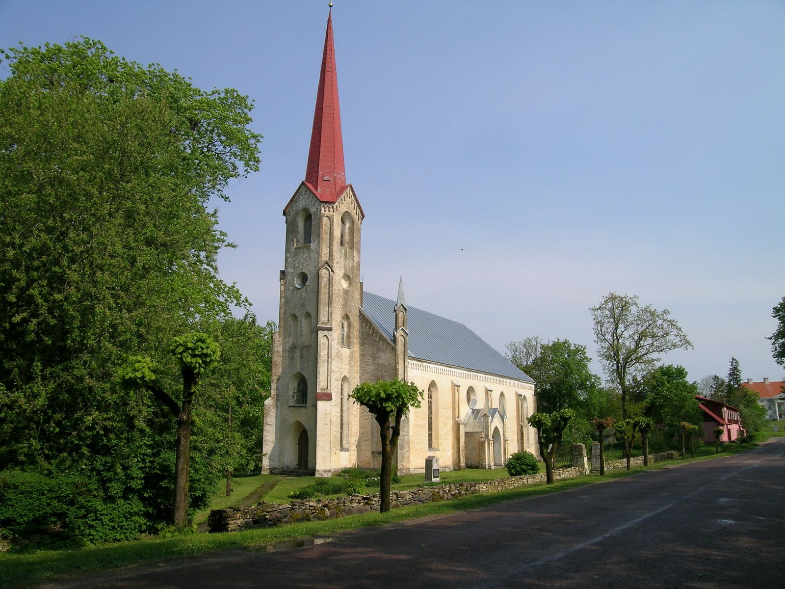 Lihula kirik